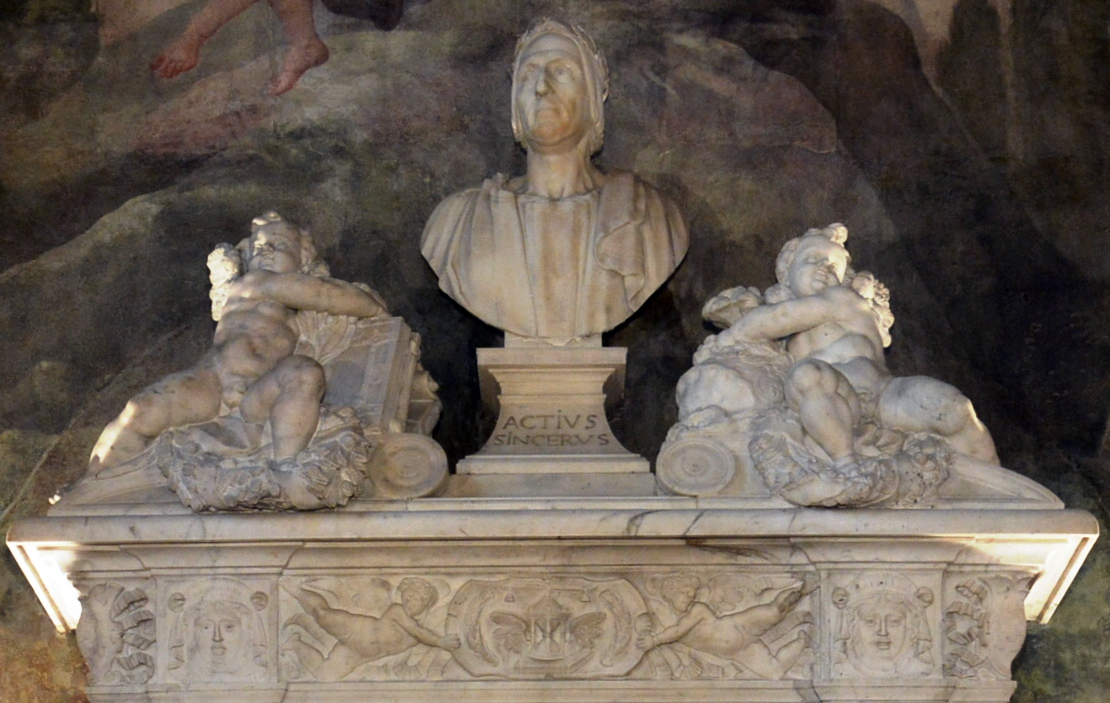 Tomba Sannazzaro, Napoli